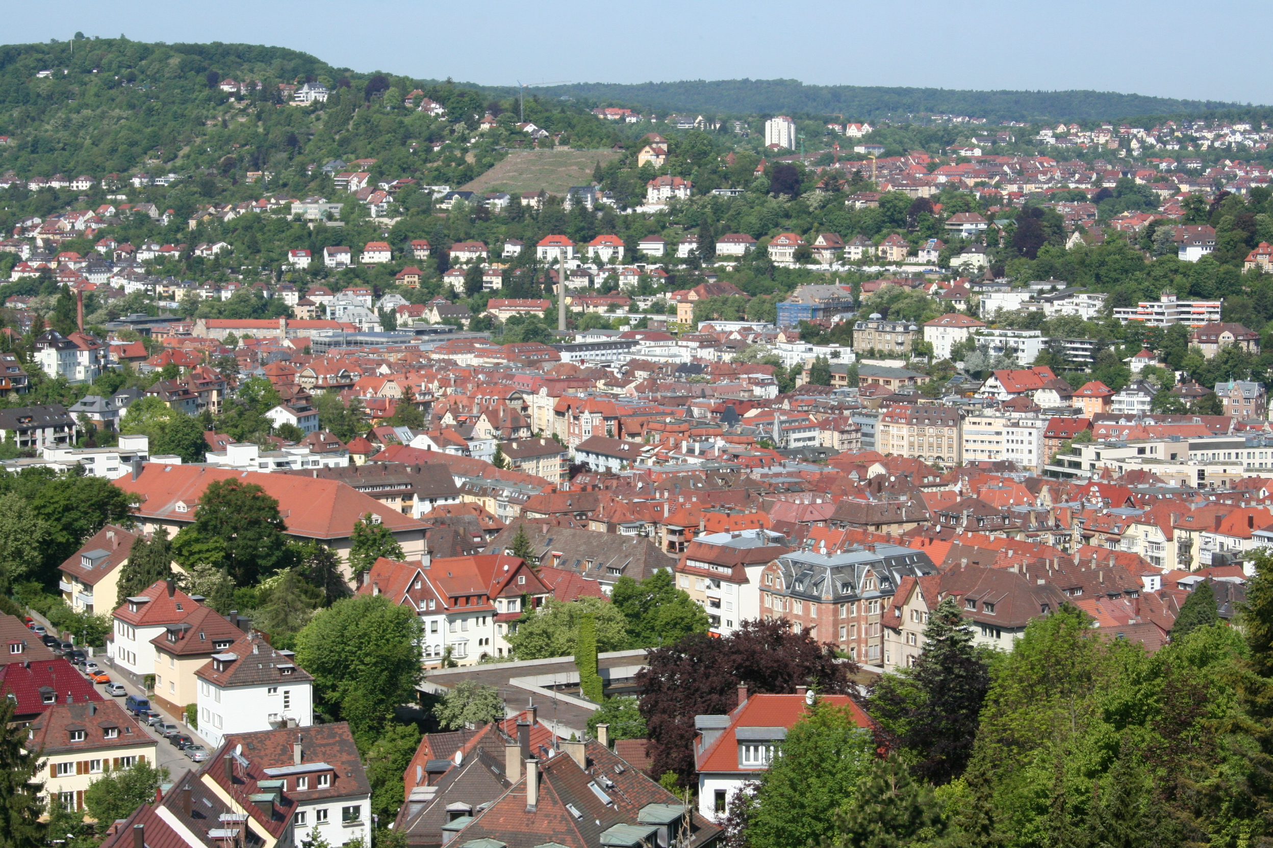 Stuttgart-Süd von der Neuen Weinsteige aus gesehen. Im Hintergrund links die Hasenbergsteige.